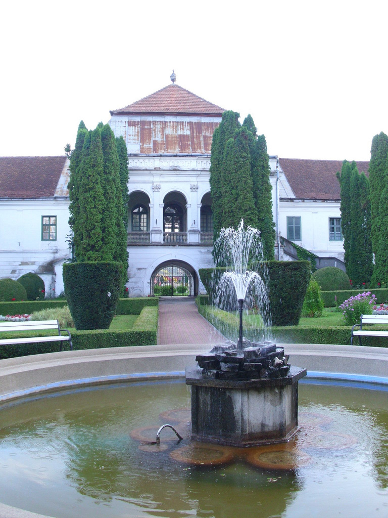 Castelul Wesselenyi - Jibou